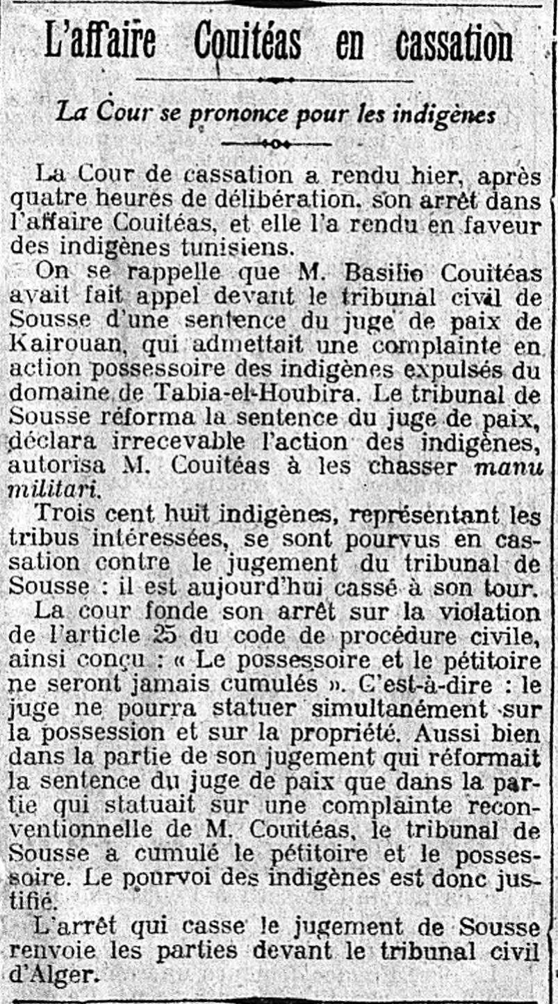 Article du Matin du 16 mai 1911 relatant la décision de la Cour de cassation dans l'affaire Couitéas